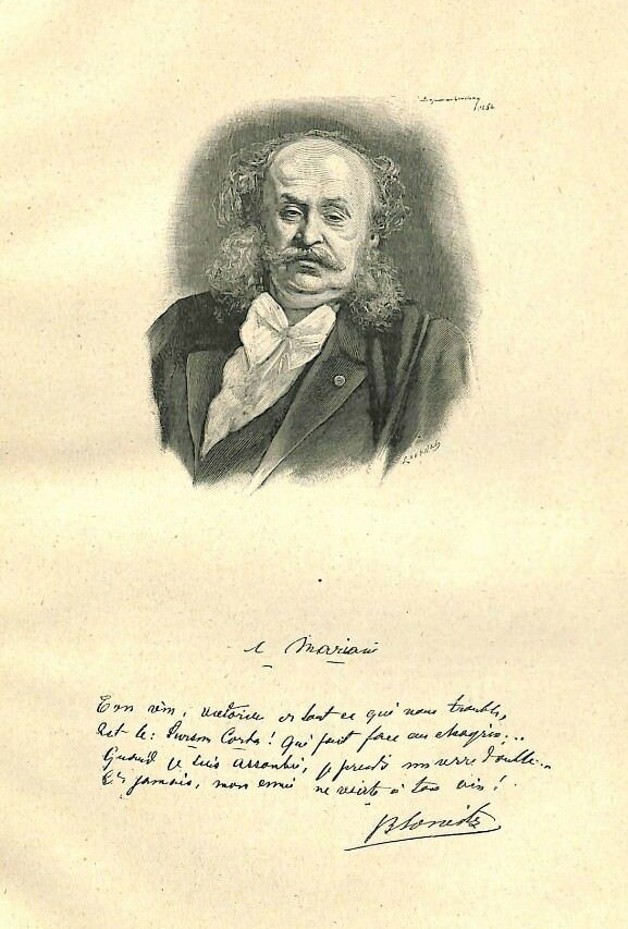 Czech (and later, French) journalist Henri Blowitz (1825-1903)